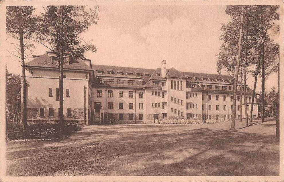 Vue générale sur l'institut Air et Soleil (Pro Juventute) à Lavacherie sur Ourthe (province du Luxembourg).